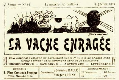 En-tête du journal montmartrois La vache enragée.